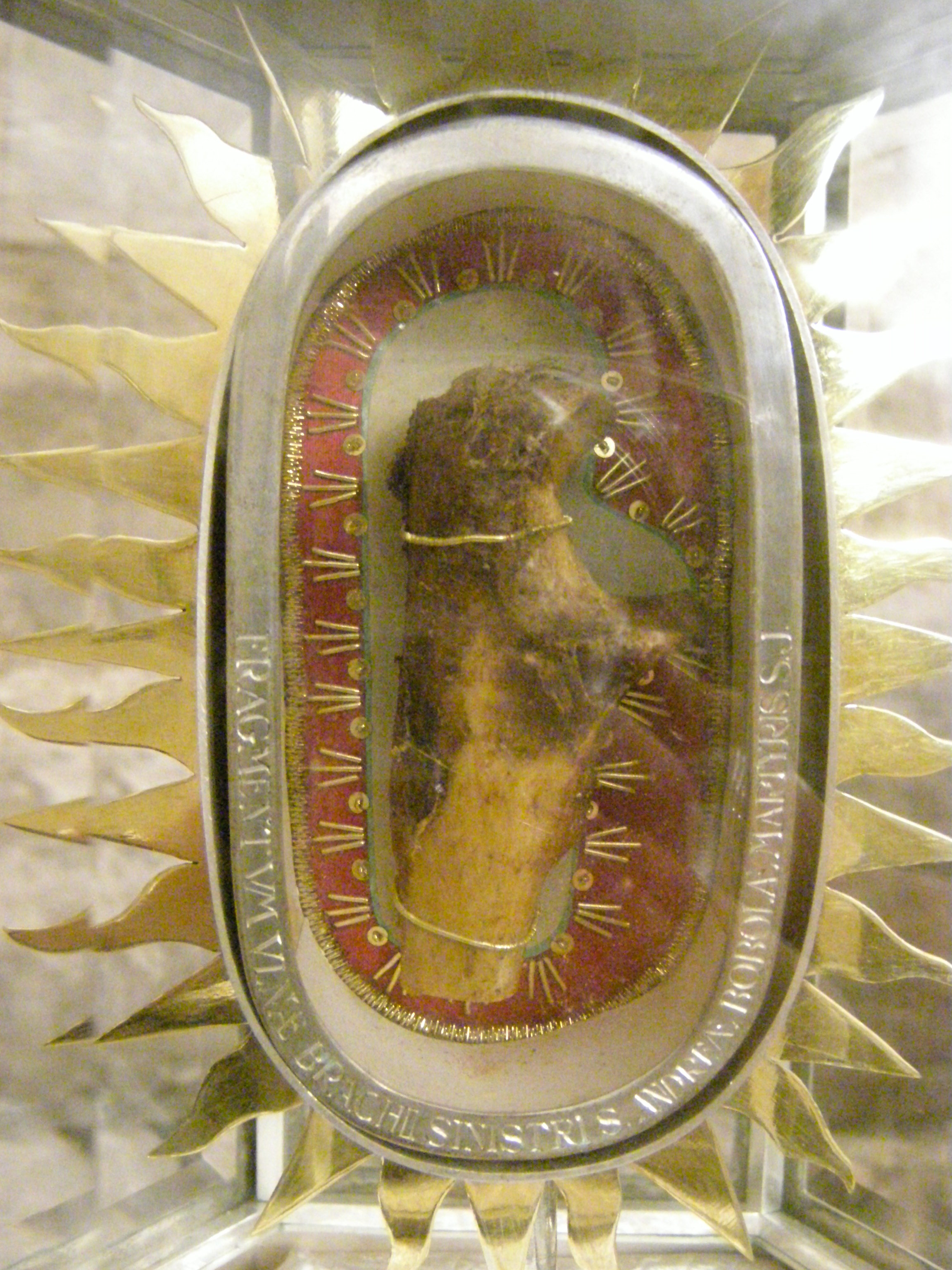 Relikwiarz św. Andrzeja Boboli w krypcie kościoła św. Kazimierza w Wilnie